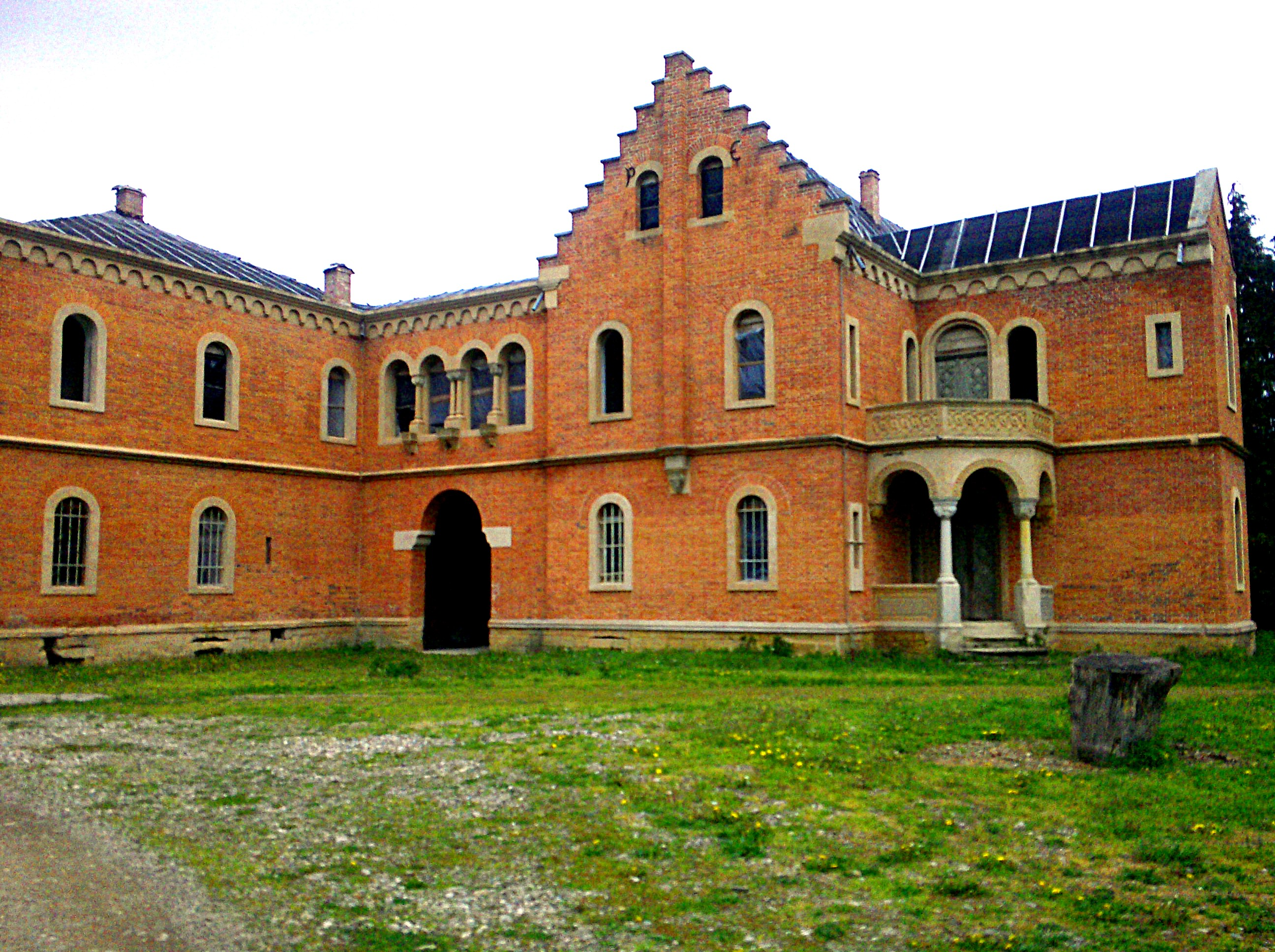 el castillo de Hemeiuş